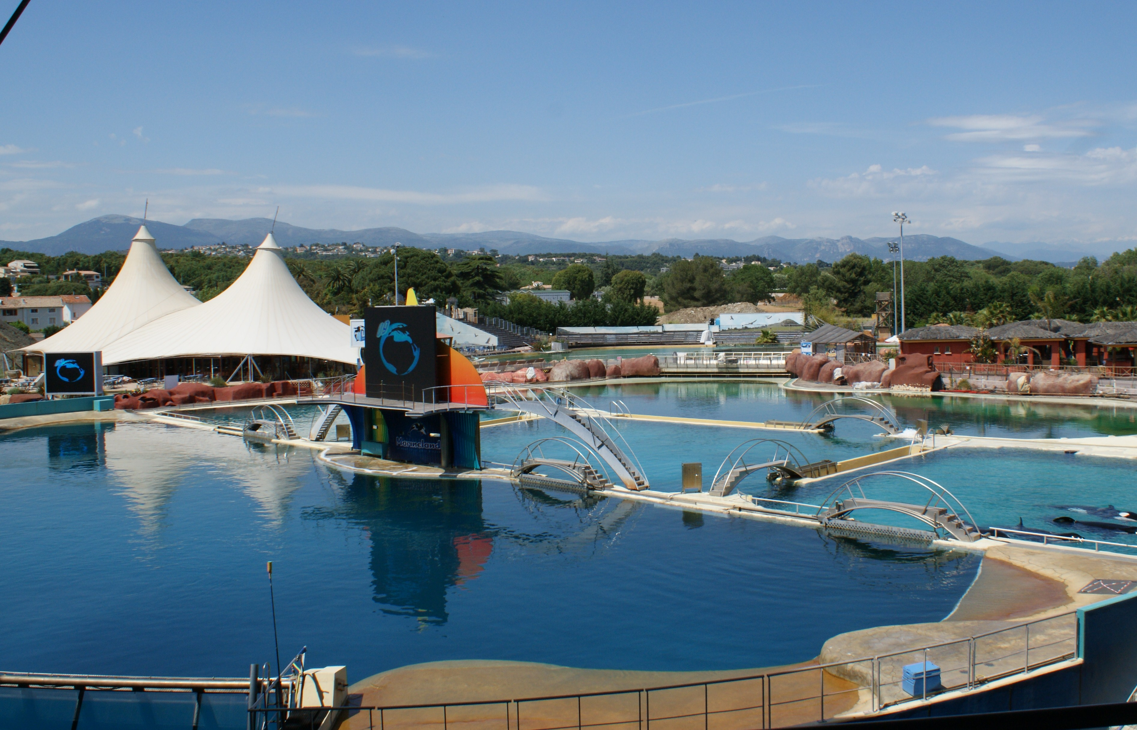 Bassins du marineland d'Antibes